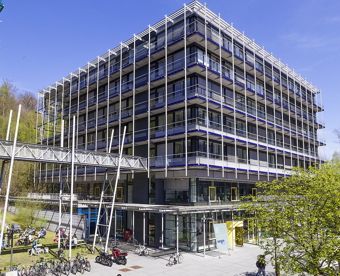 Ansicht des Gebäudes